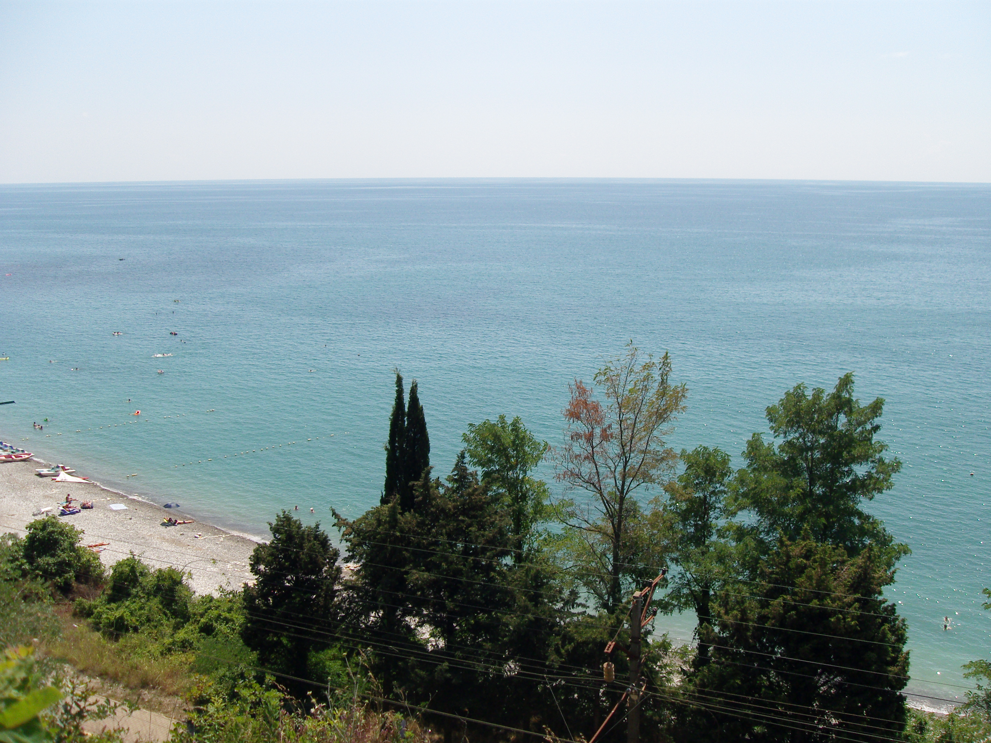 Побережье Чёрного моря близ посёлка Вишнёвка, Лазаревский район г. Сочи